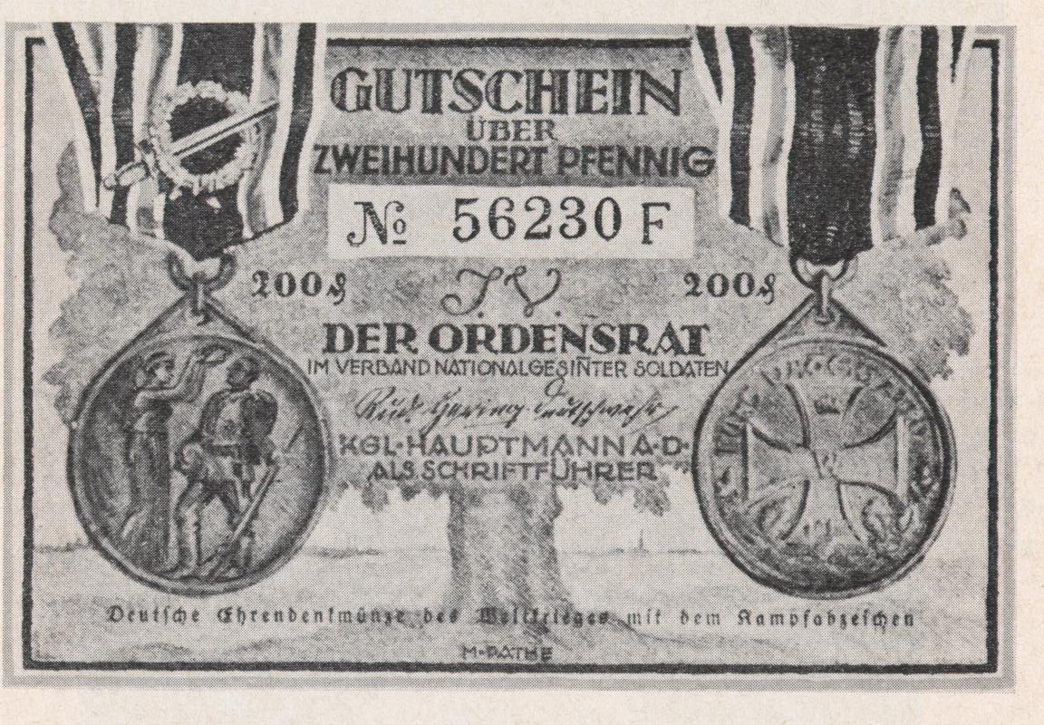 Vorderseite der Notgeldscheine 'Deutsche Ehrendenkmünze des Weltkriegs, am schwarz-weiß-roten Ordensband mit Kampfabzeichen (Deutsche Ehrenlegion.